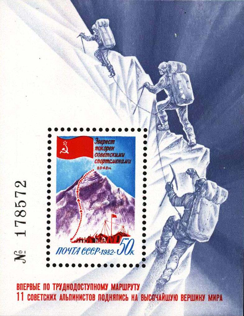 Почтовый блок СССР «Покорение Эвереста советскими спортсменами», выпущенный 20 декабря 1982 года. На марке в блоке изображён Государственный флаг СССР, схема маршрута экспедиции из базового лагеря на вершину, памятный текст: «Эверест покорен советскими спортсменами». На полях блока изображены совершающие восхождение на Эверест альпинисты, номер, памятный текст: «Впервые по труднодоступному маршруту 11 советских альпинистов поднялись на высочайшую вершину мира». Художник — Ю. Левиновский. Номер — 5356 (ЦФА). Тираж — 800 тыс. экз.